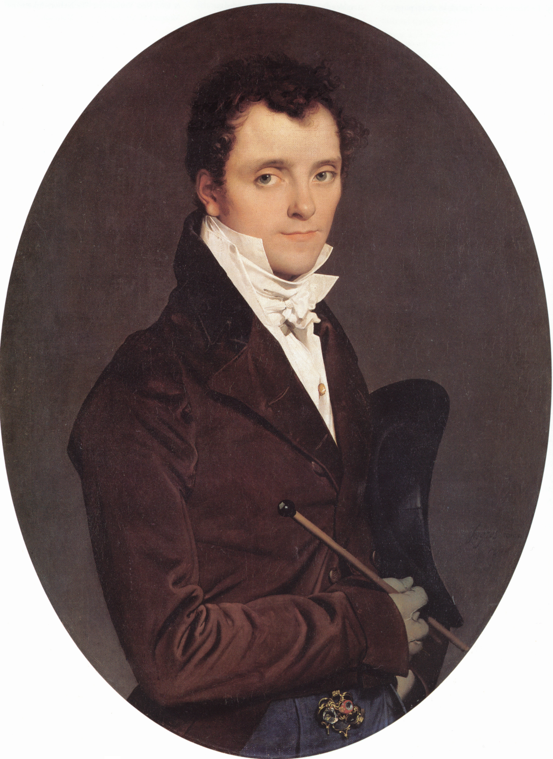 Ingres, Portrait d'Edmé Bochet 1811 musée du Louvre